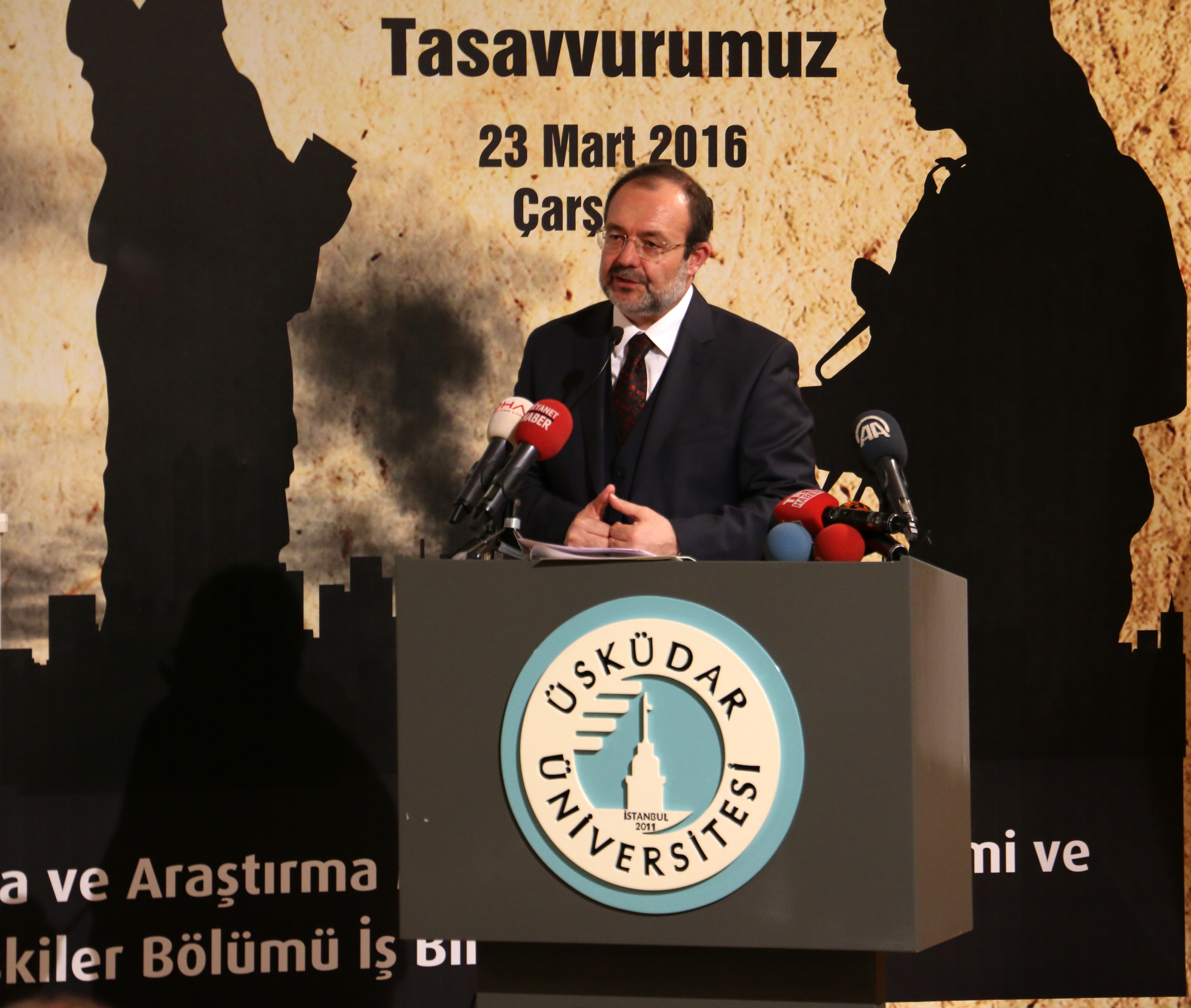 Diyanet Isleri Baskani Mehmet Gormez, Uskudar Universitesinde